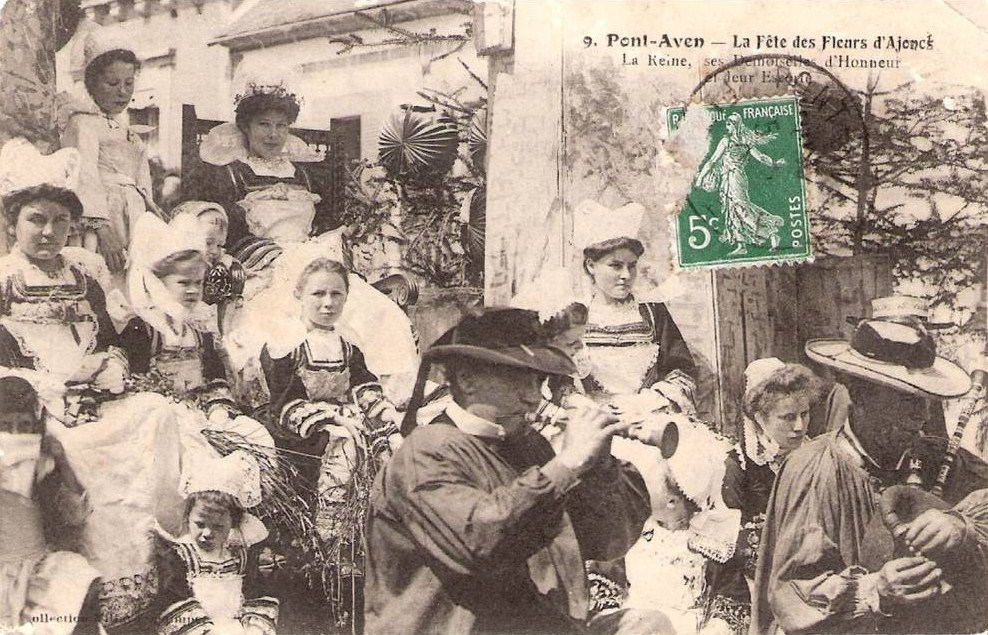 La Reine des Fleurs d'Ajoncs, ses demoiselles d'honneur et son escorte.